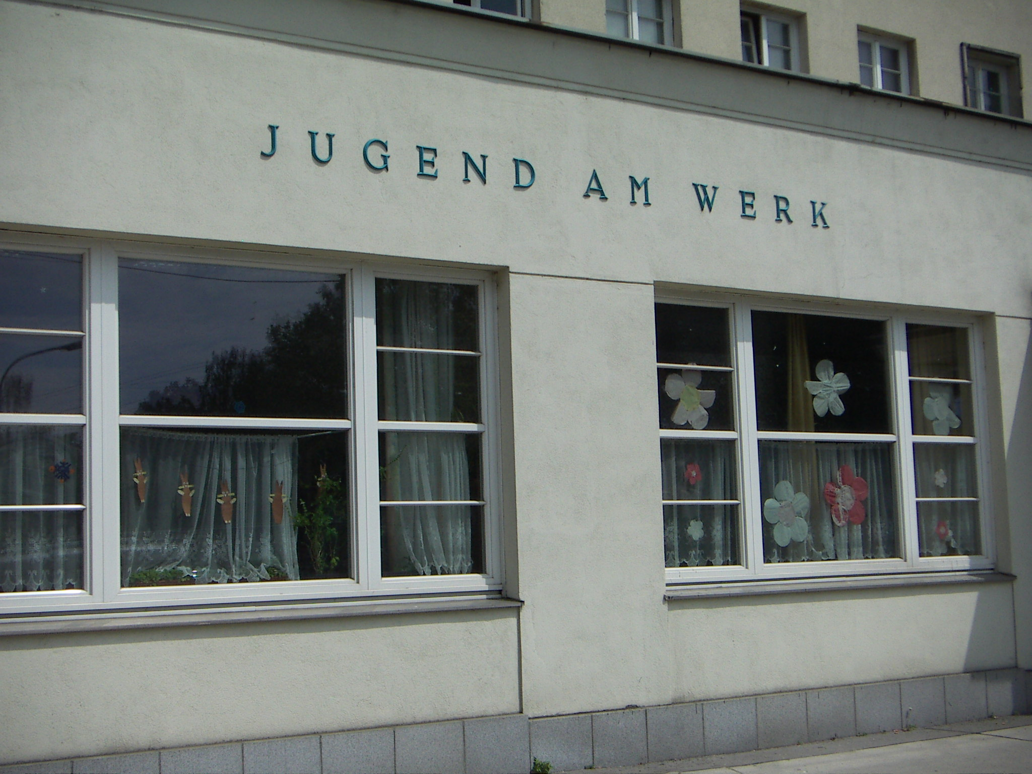 Jugend am Werk, Karl-Seitz-Hof, Floridsdorf, Vienna